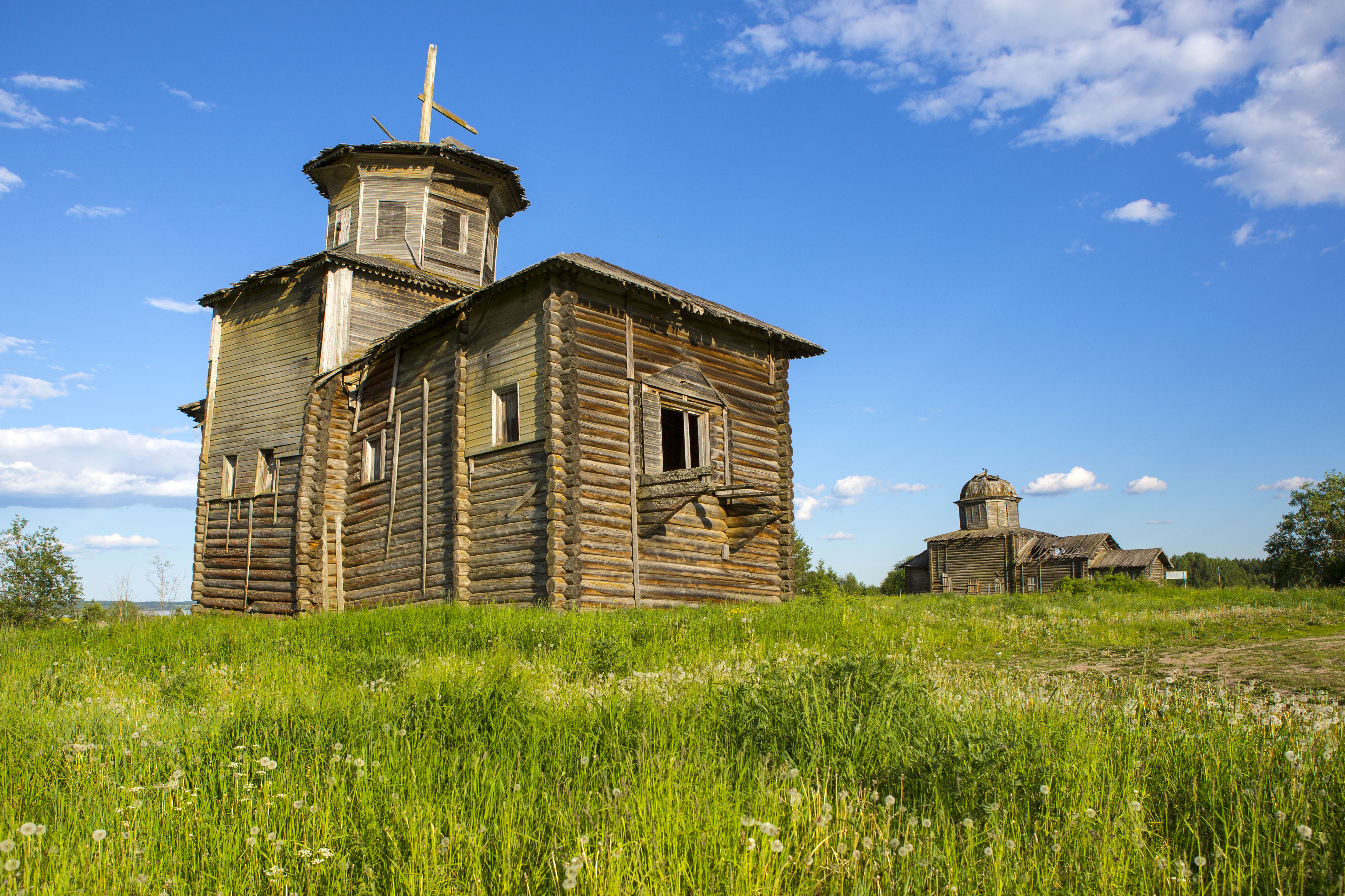 Храмовый комплекс: Тулгас, Виноградовский район, Архангельская область